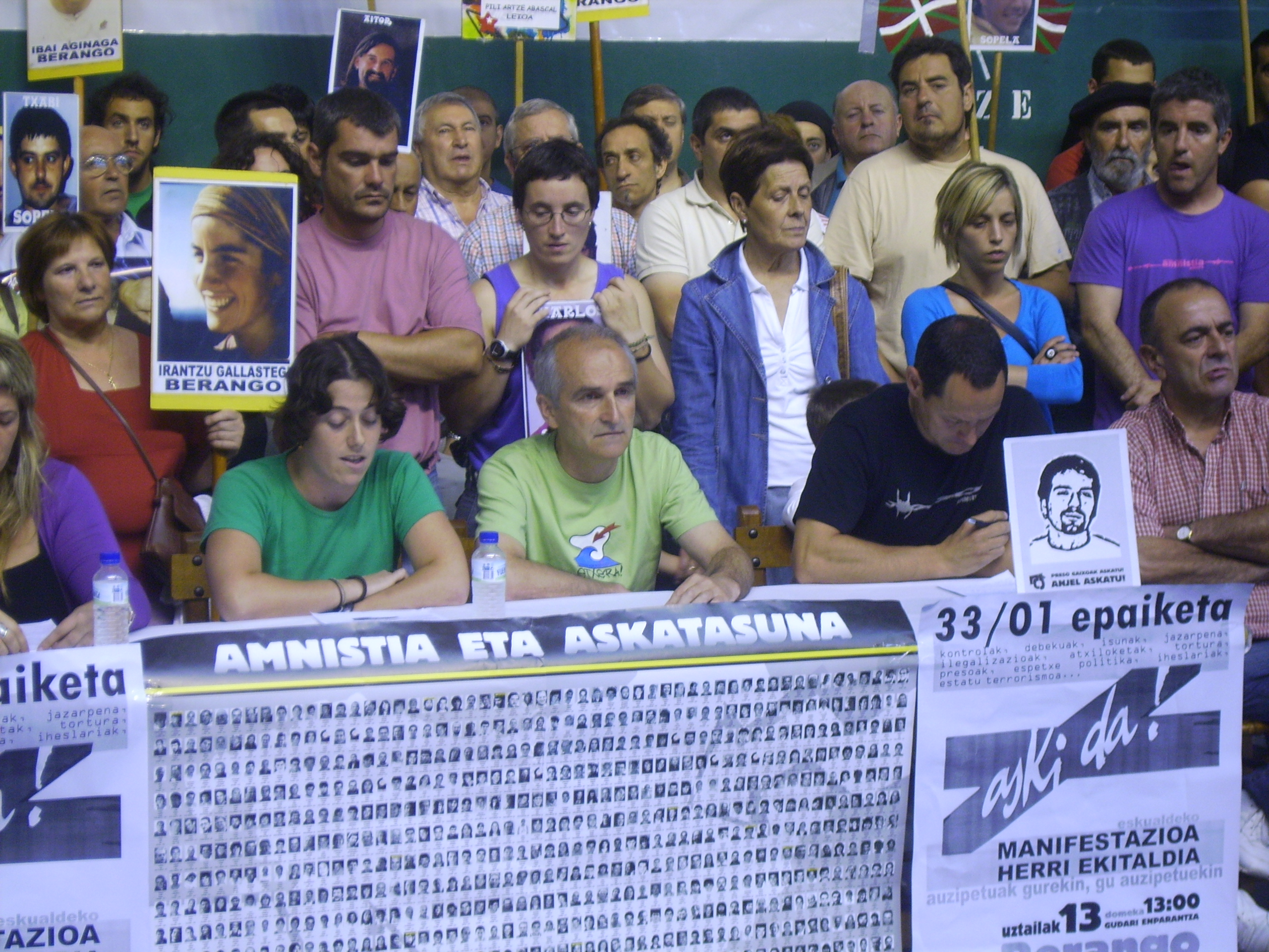 33/01 auziaren inguruko prentsaurrekoa Berangon, 2008ko uztailaren 5ean